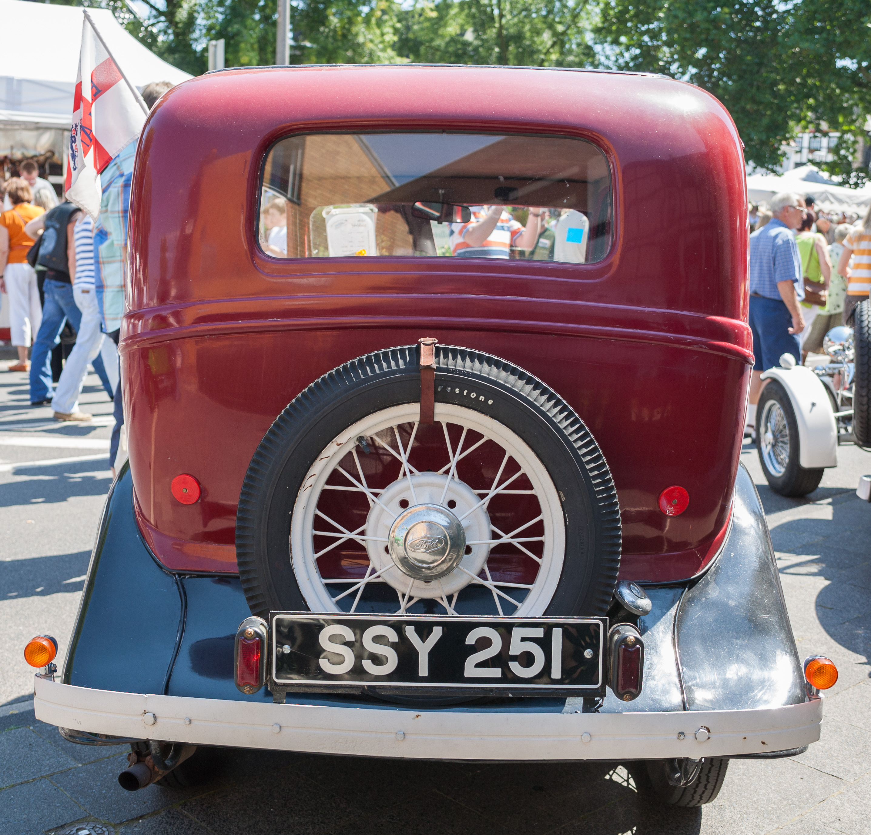 Rheinbach Classics 2007 – Heckansicht eines Ford Modell Y